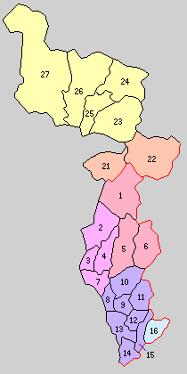 後の大阪府豊能郡域の町村制時点の町村。